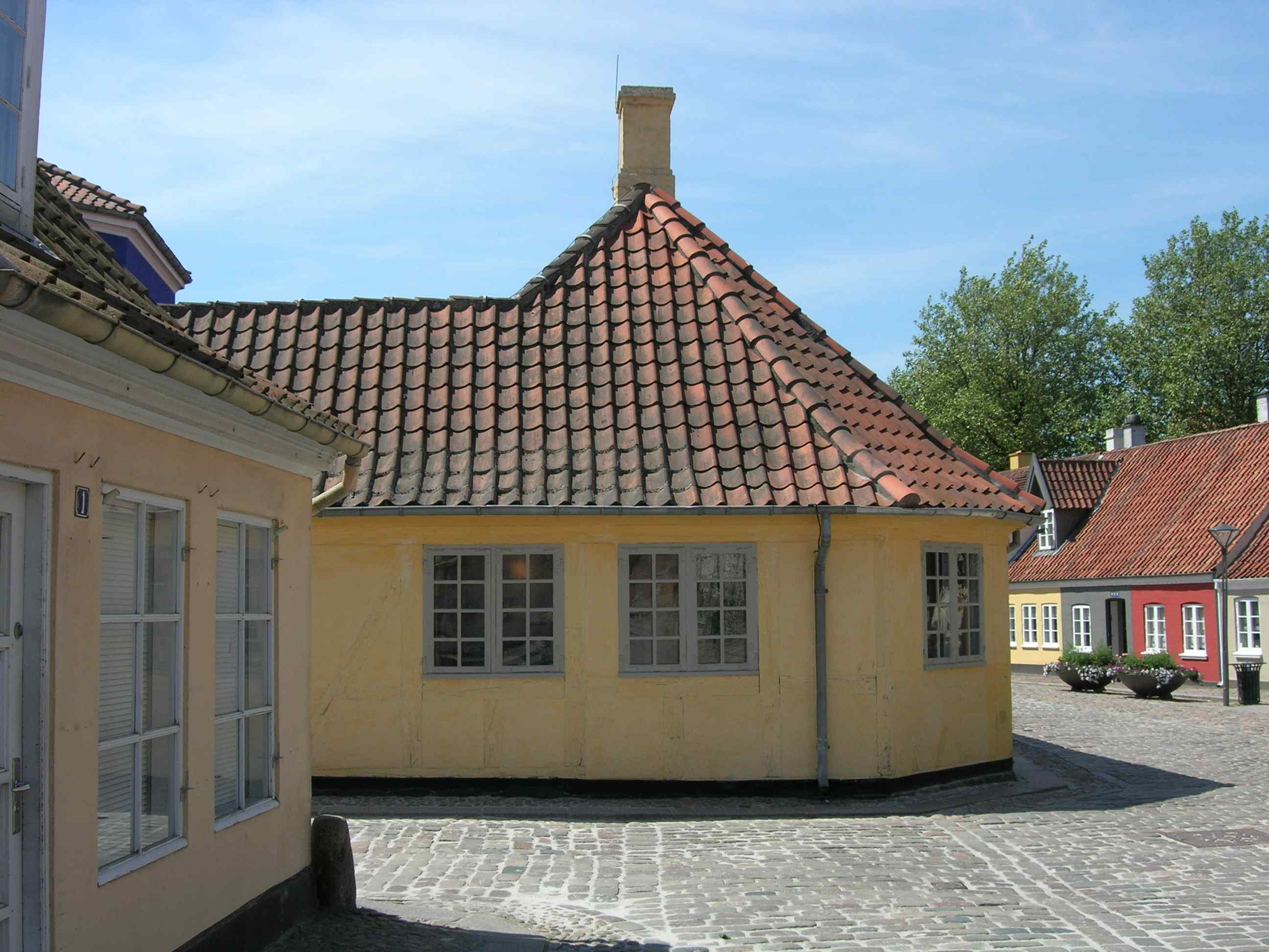 Bild vom wahrscheinlichen Geburtshaus von Hans Christian Andersen in Odense (Dänemark)